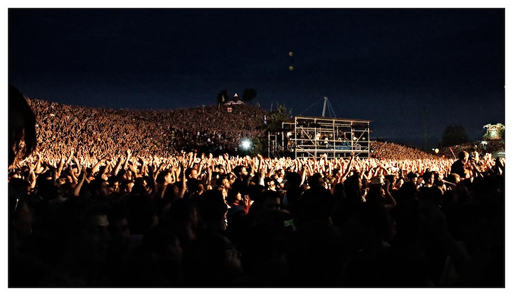 Das Fest 2004